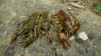 Alcuni esemplari adulti di Gamberi di ruscello del rio Tassaro